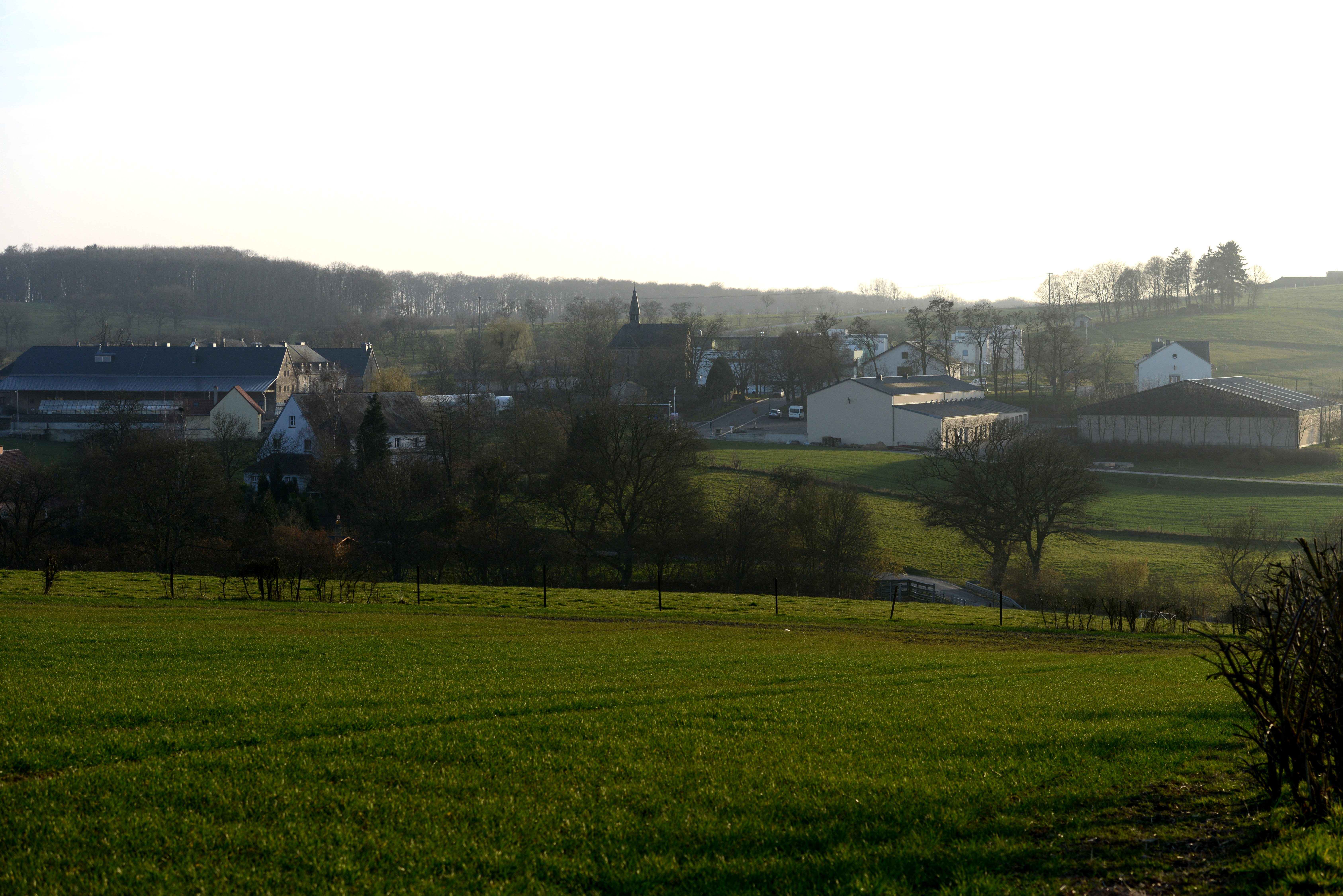 Vue op de Prisong vu Giwenech.